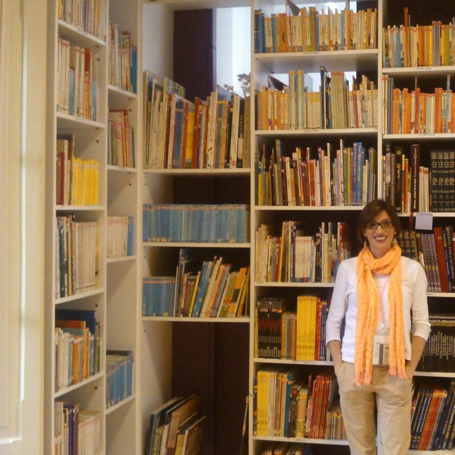 Fotografía de Tessie Solinis Casparius